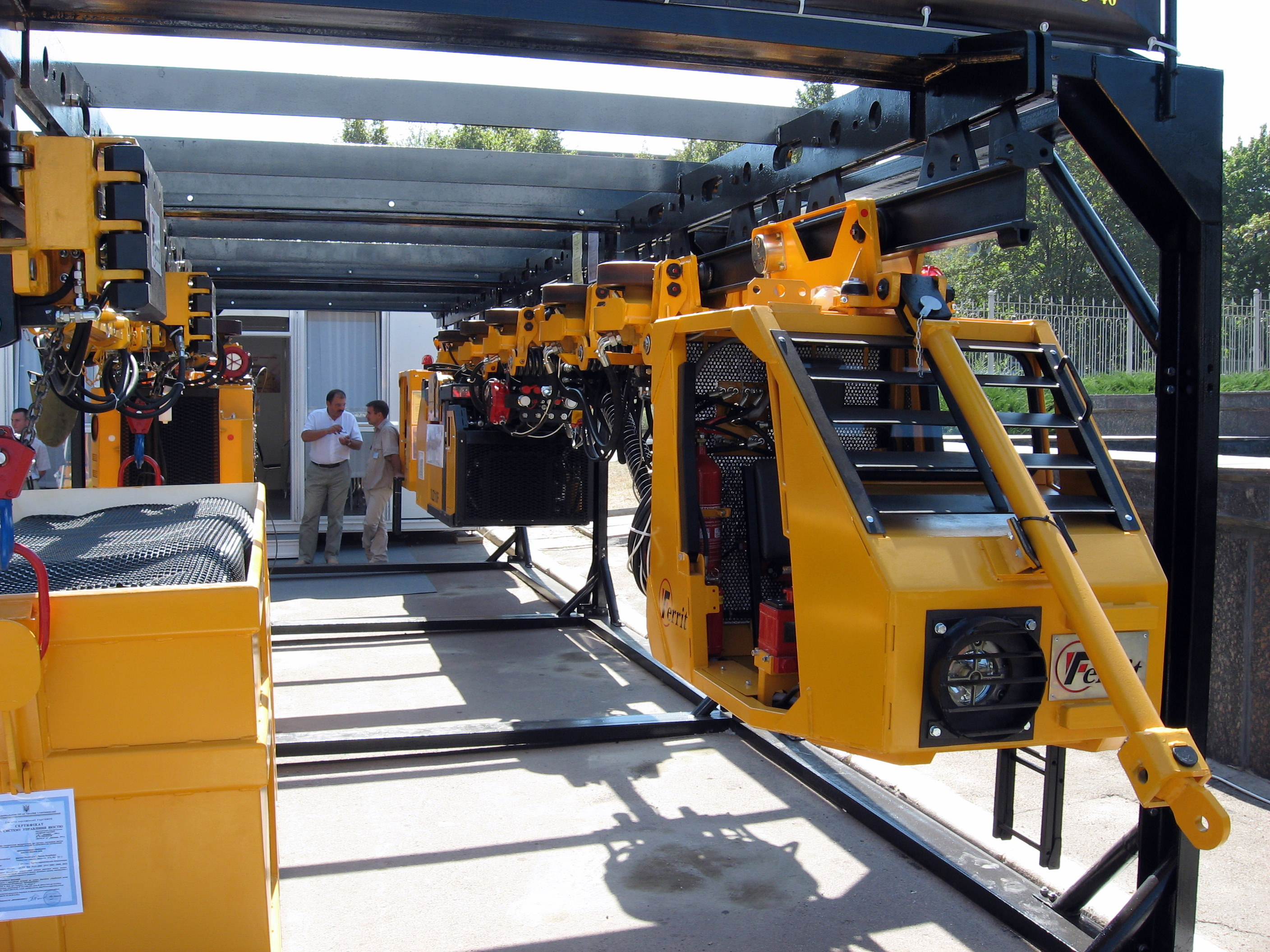 Фото з виставки Вугілля-Майнінг 2008